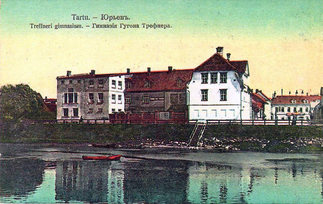 Tartu Treffneri Gümnaasium, umbes 1910.